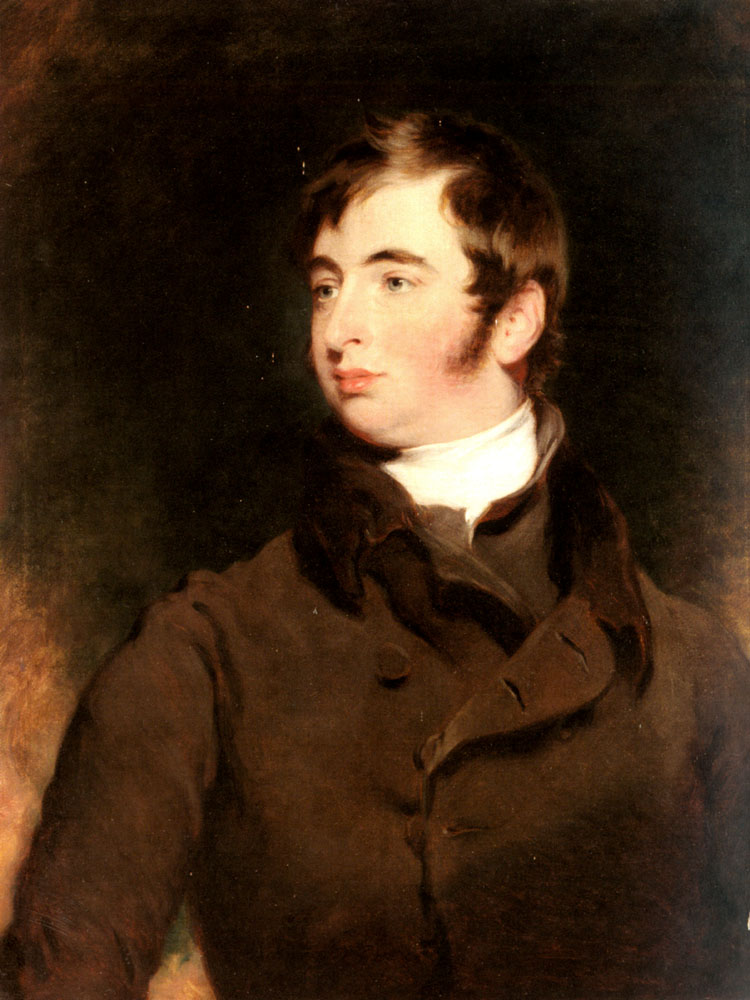 George Pratt, 2nd Marquess Camden (1799-1866)